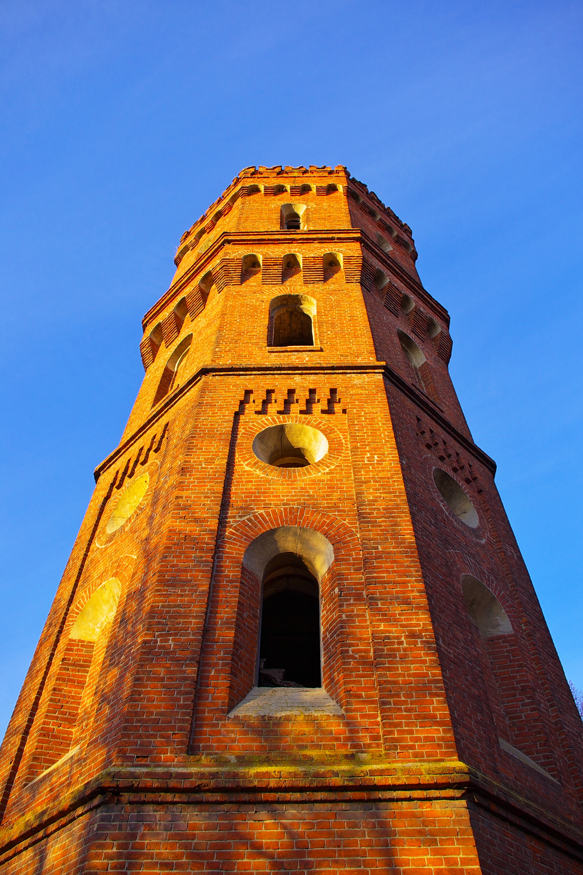 Башня водонапорная (Москва и Московская область, Зарайск, Красноармейская улица)